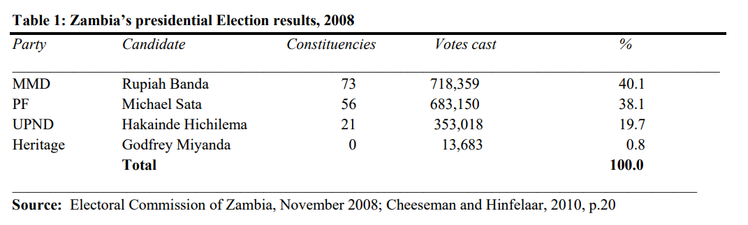 פירוט תוצאות הבחירות בזמביה, 2008